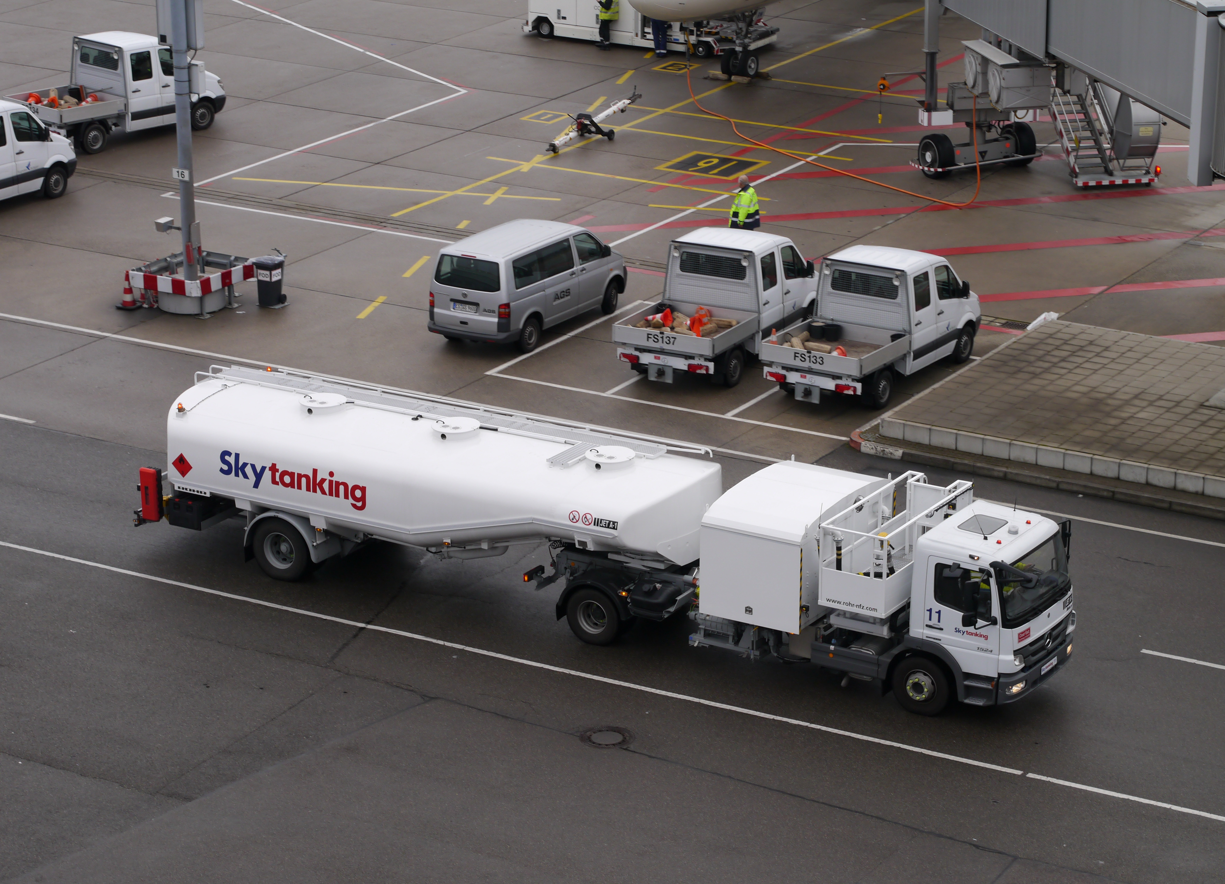 Tankwagen auf dem Stuttgarter Flughafen